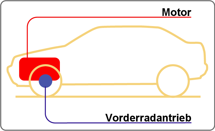 * Beschreibung: Antriebsschema * Quelle: Gezeichnet von Teccirio und von CrazyD ins Deutsche konvertiert. Original: [1] * Lizenzstatus: GNU FDL * Description: engine-scheme * Source: Made by Teccirio and converted into German by CrazyD. Original: [2] * Licence: GNU FDL